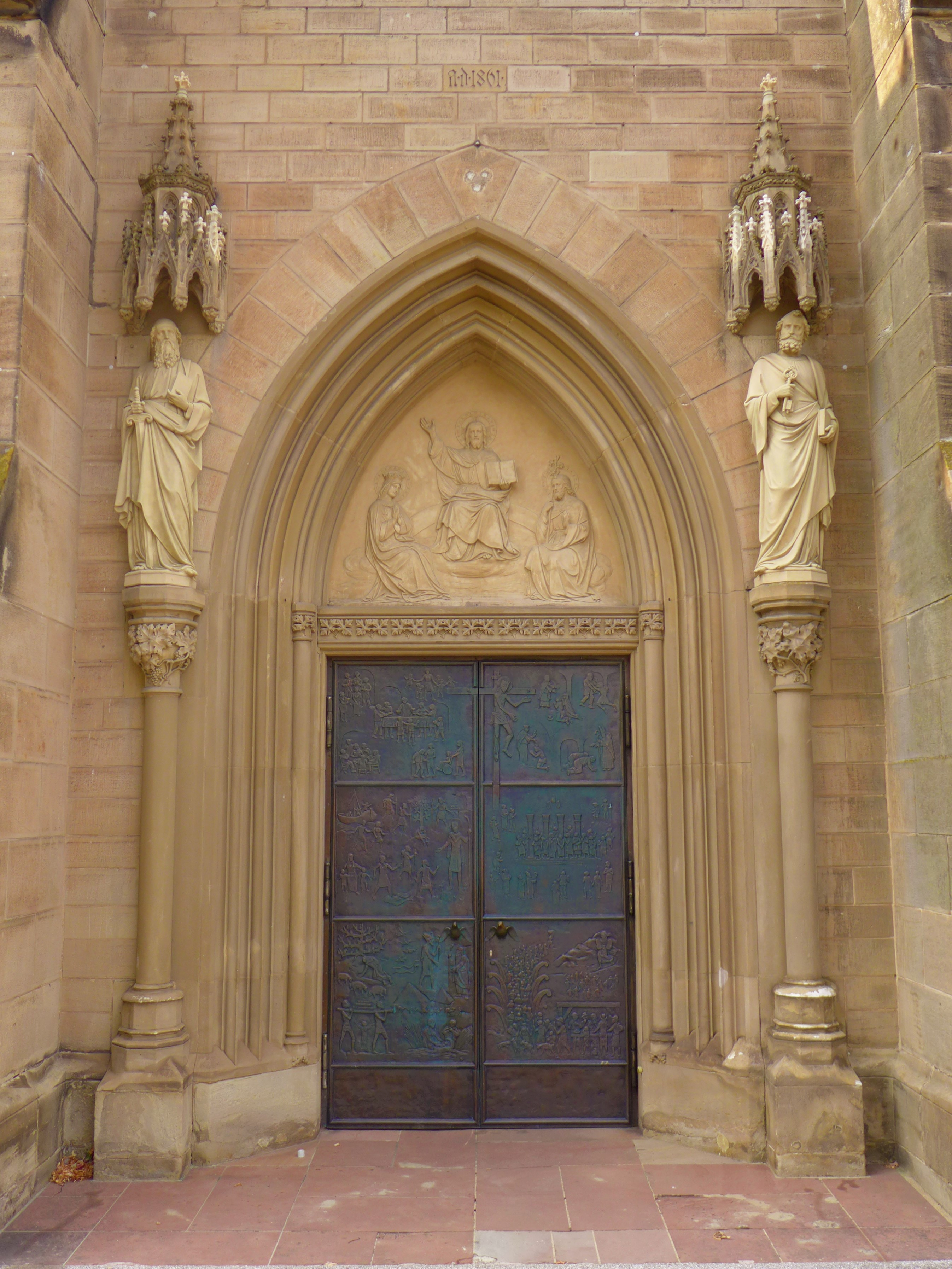 St. Katharina (Wallerfangen), Seitenportal